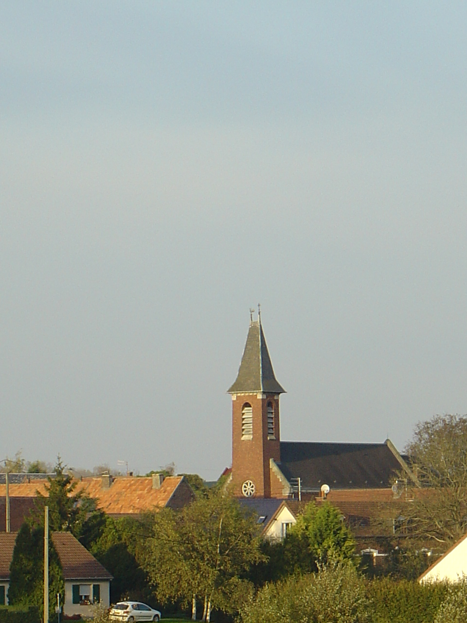 Église de Guémappe